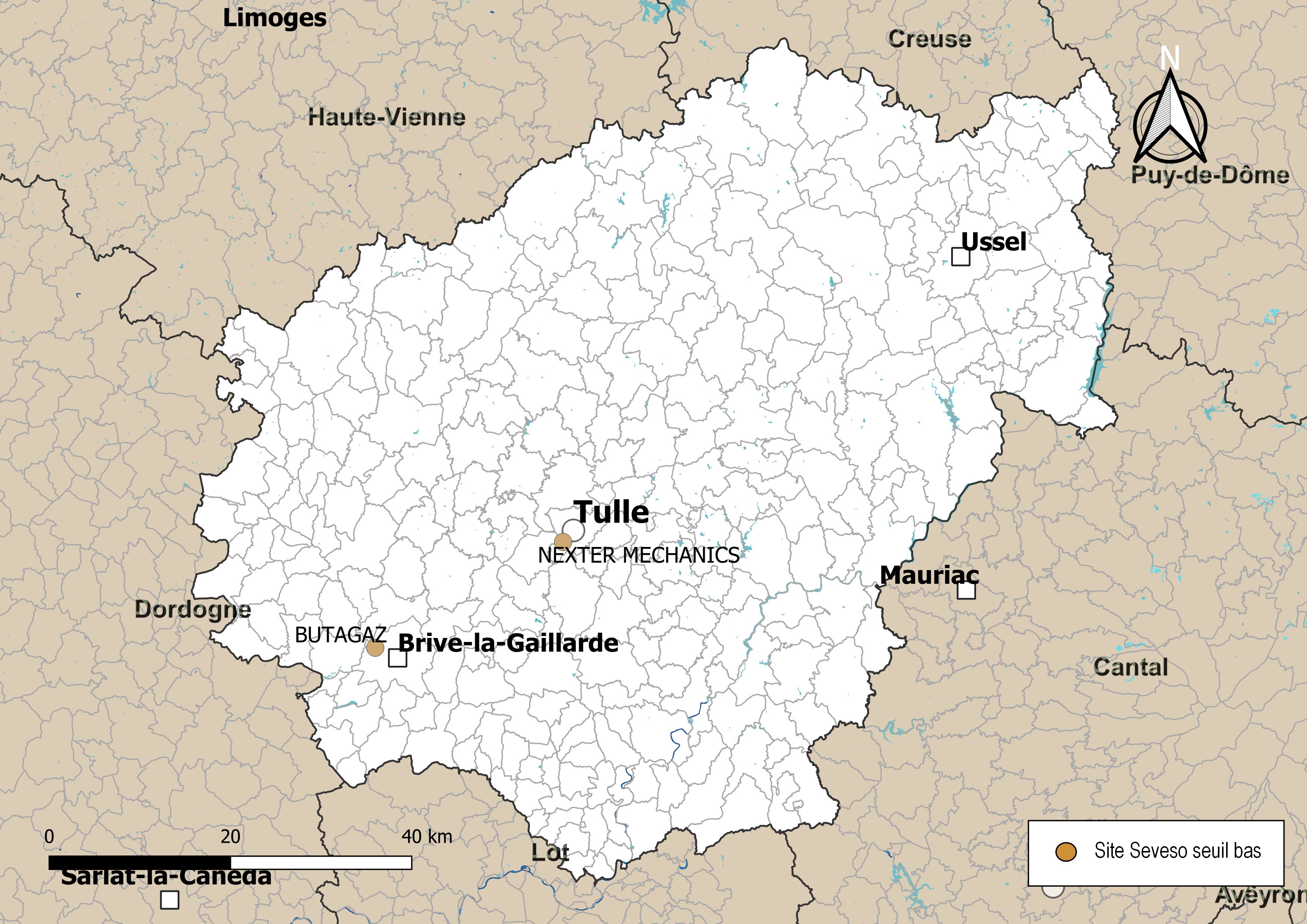 Carte de localisation des sites Seveso seuil bas dans le département de la Corrèze (Nouvelle-Aquitaine, France). Carte arrêtée au 3 novembre 2019.